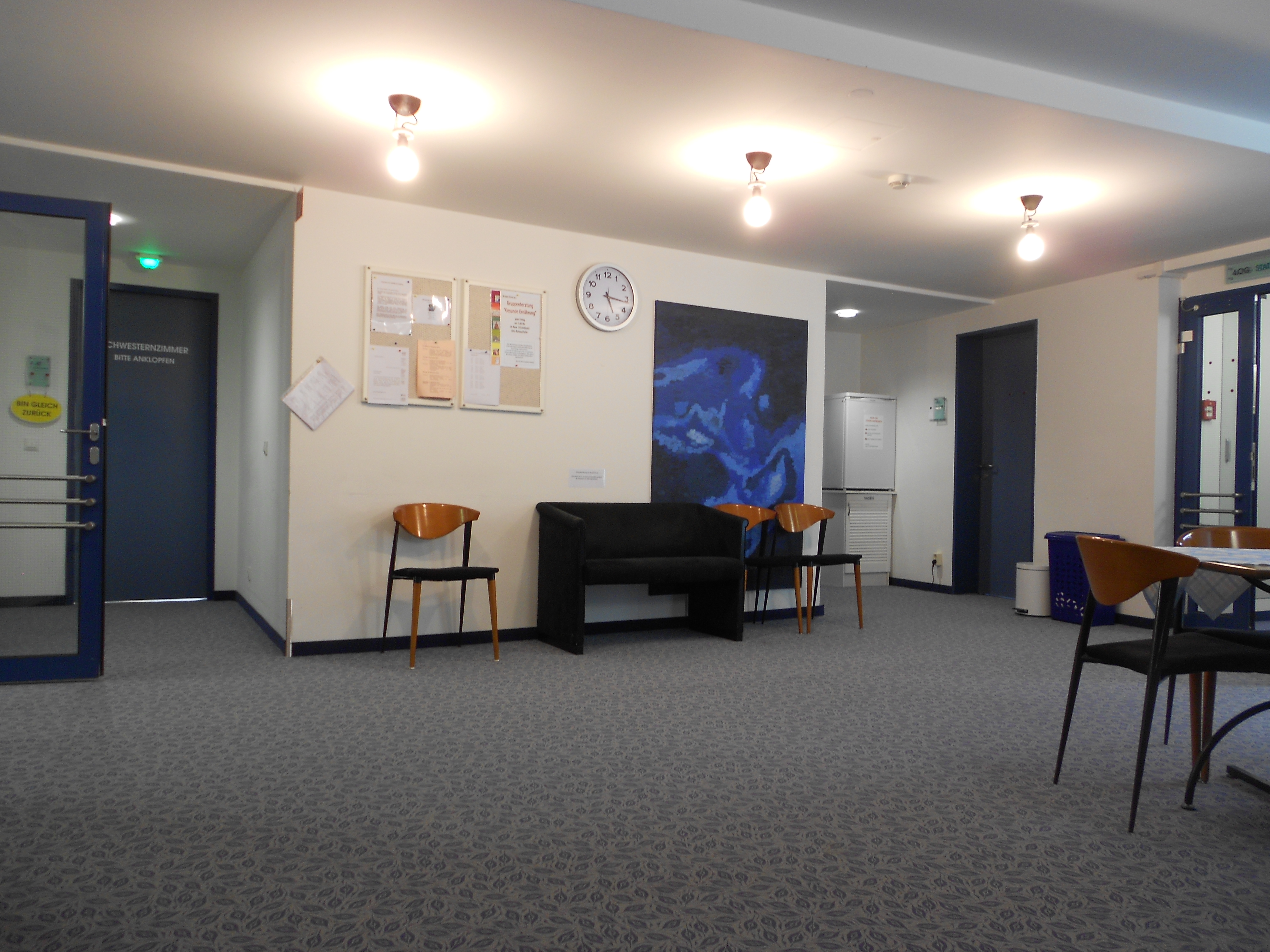 Fachklinik und Moorbad Bad Freienwalde